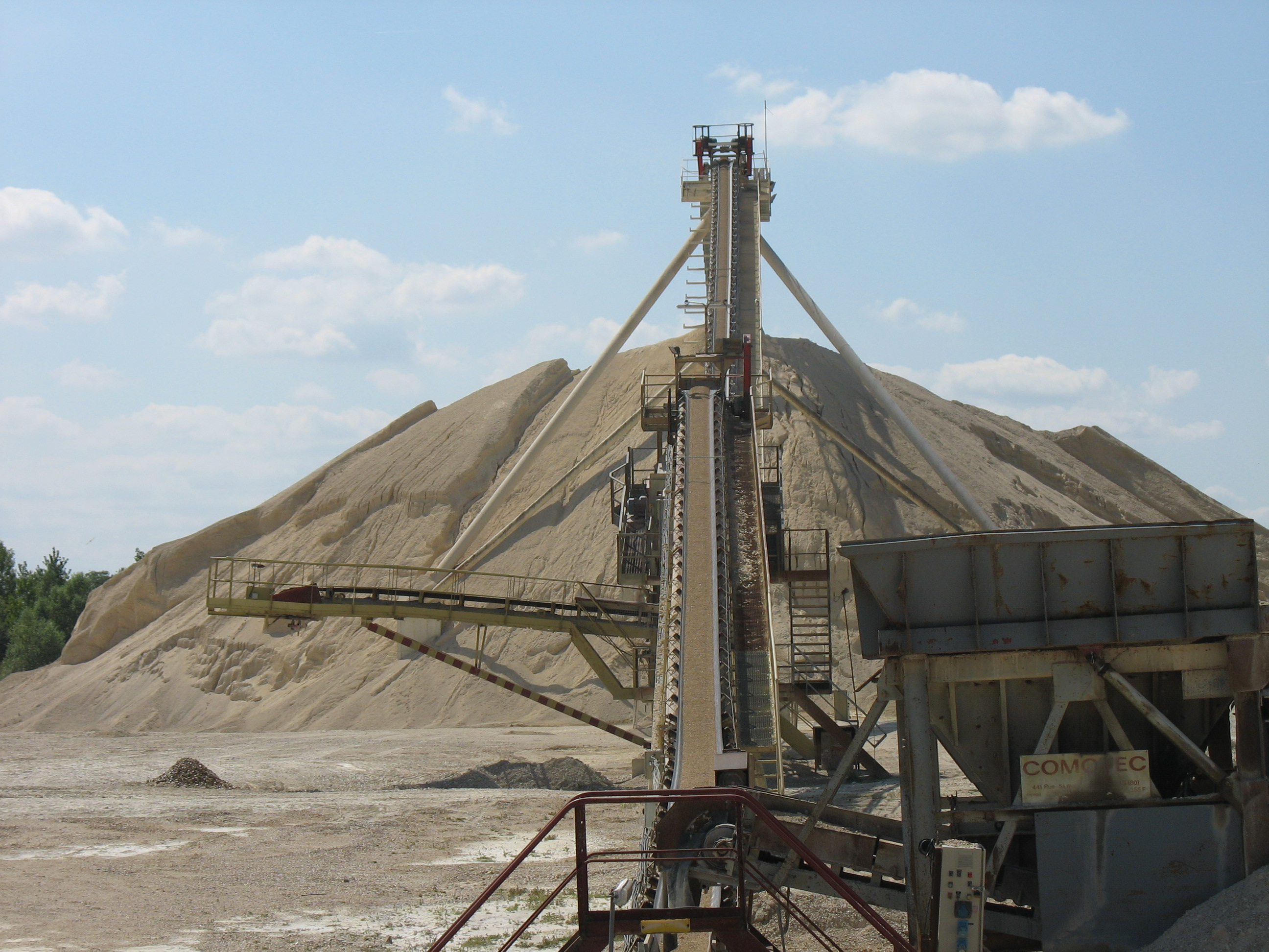 Transport et entreposage de granulats.